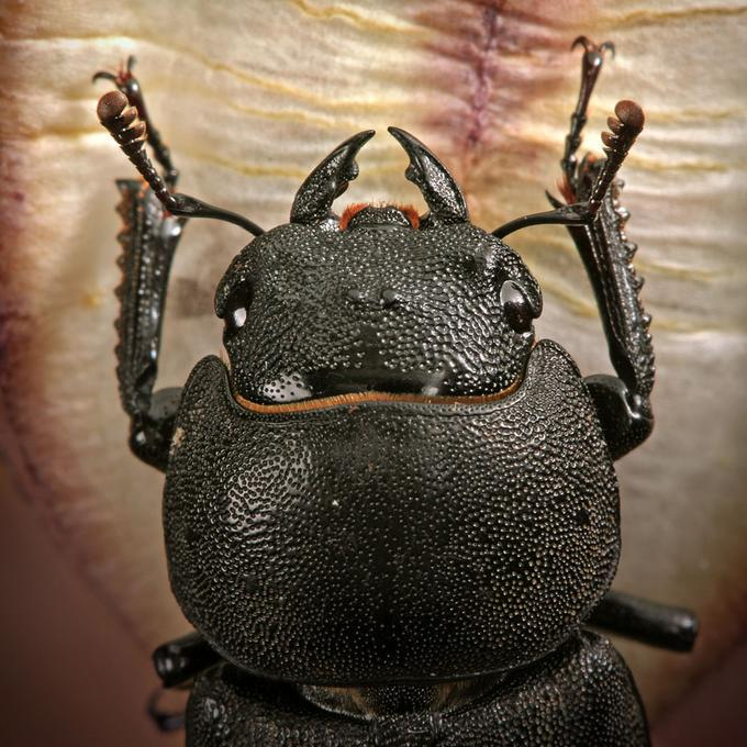 Dorcus parallelipipedus female